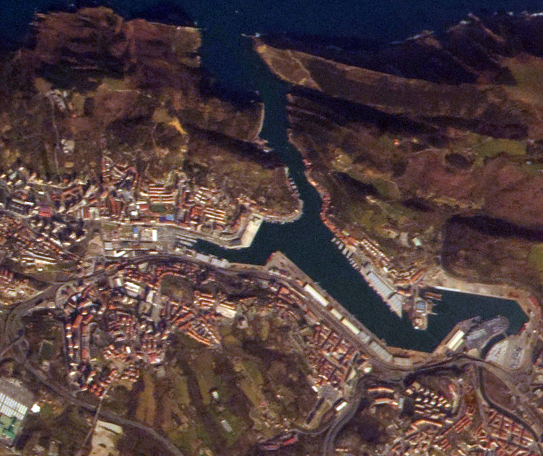 Pasaiako irudia, Thomas Pesquet astronautak Nazioarteko Espazio Estaziotik egina. Argazkiaren kolore aldaketa eta mozketa nire lana da.